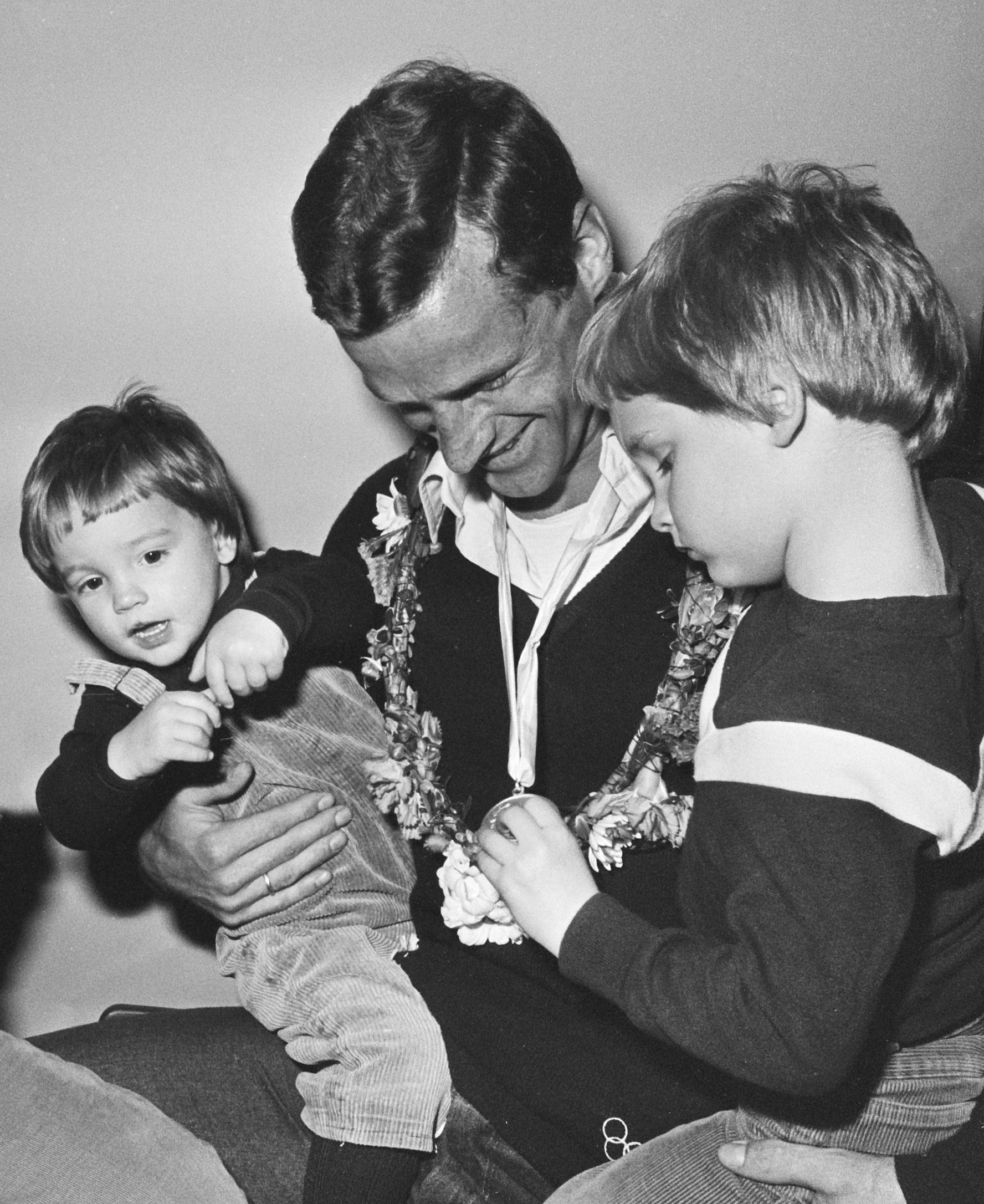 Aankomst hockeyteam terug van WK in Argentinie; Jebbink met kinderen.